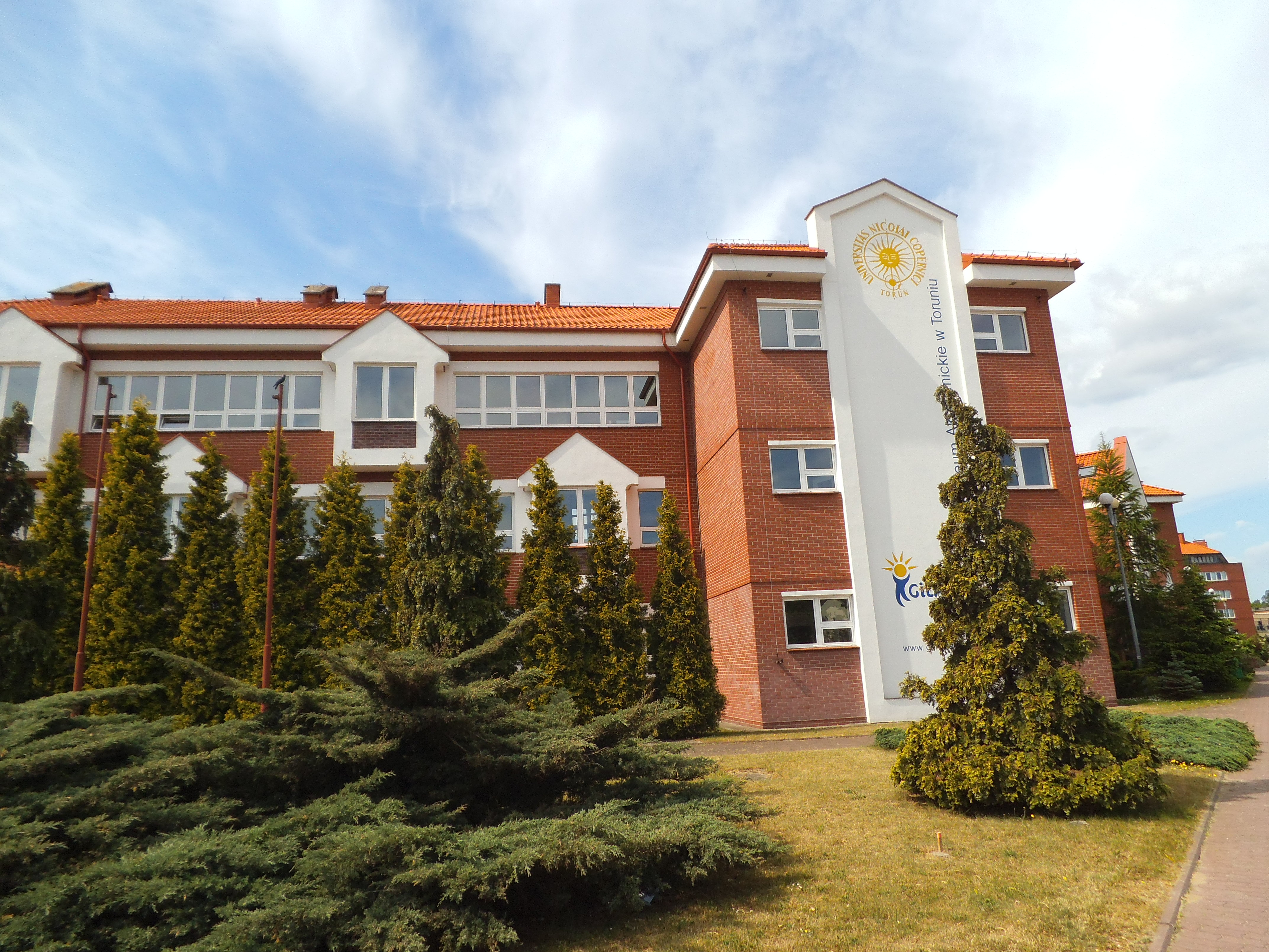 Gimnazjum i Liceum Akademickie w Toruniu1